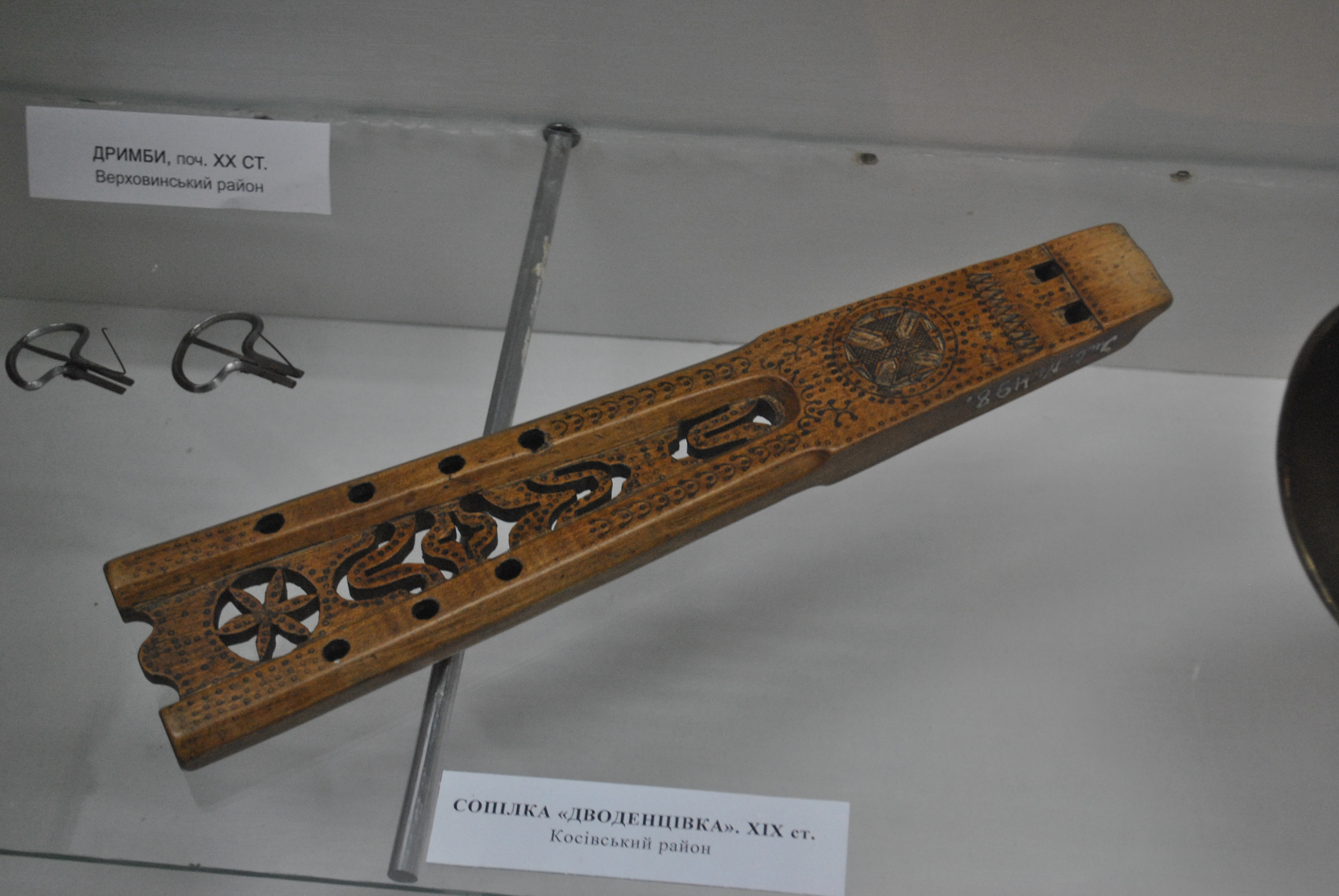 Сопілка "Дводенцівка" ХІХ ст. Верховинський район